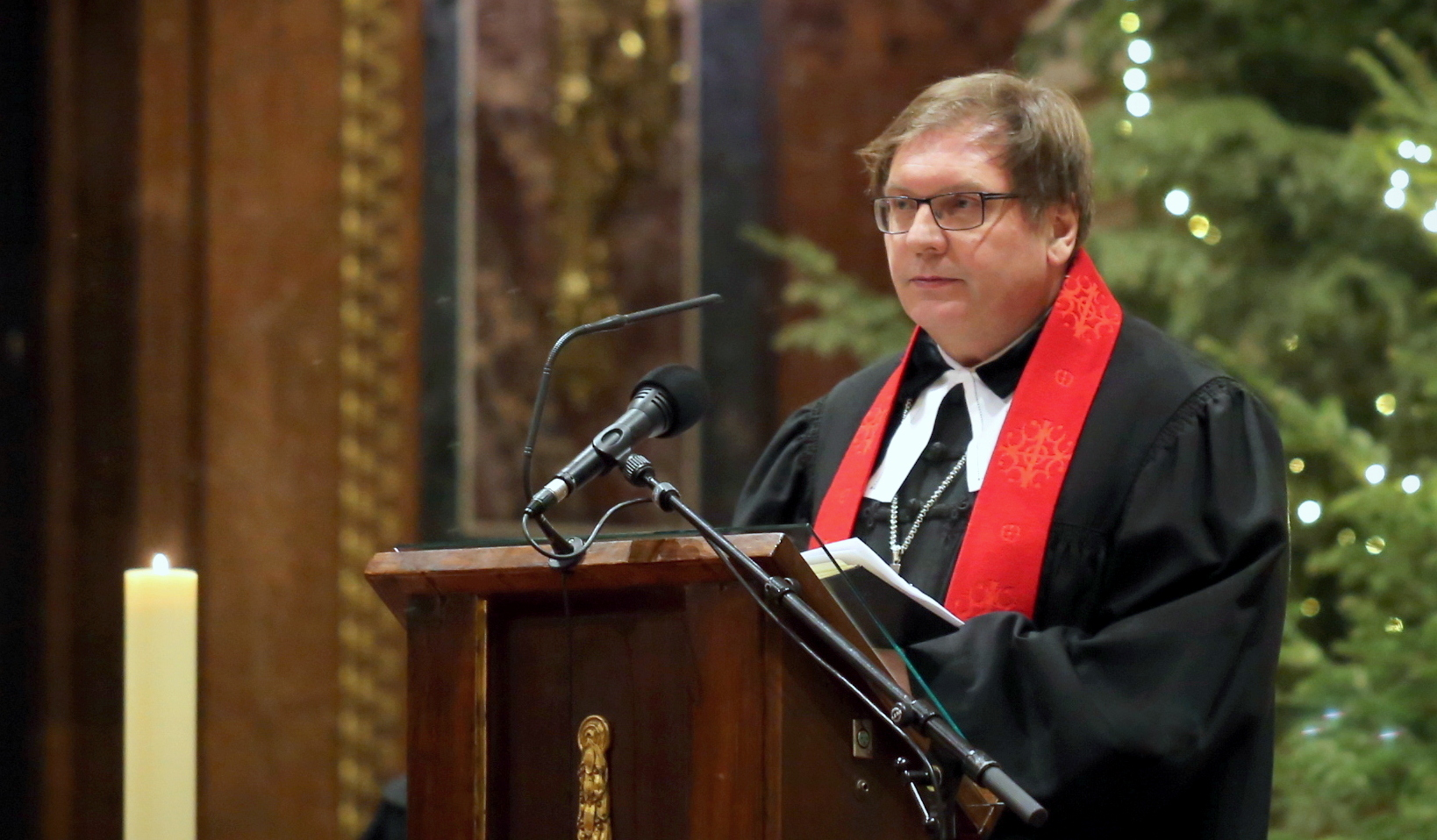 Fabiny Tamás evangélikus püspök, a 2018-as Ökumenikus Imahét megnyitóján